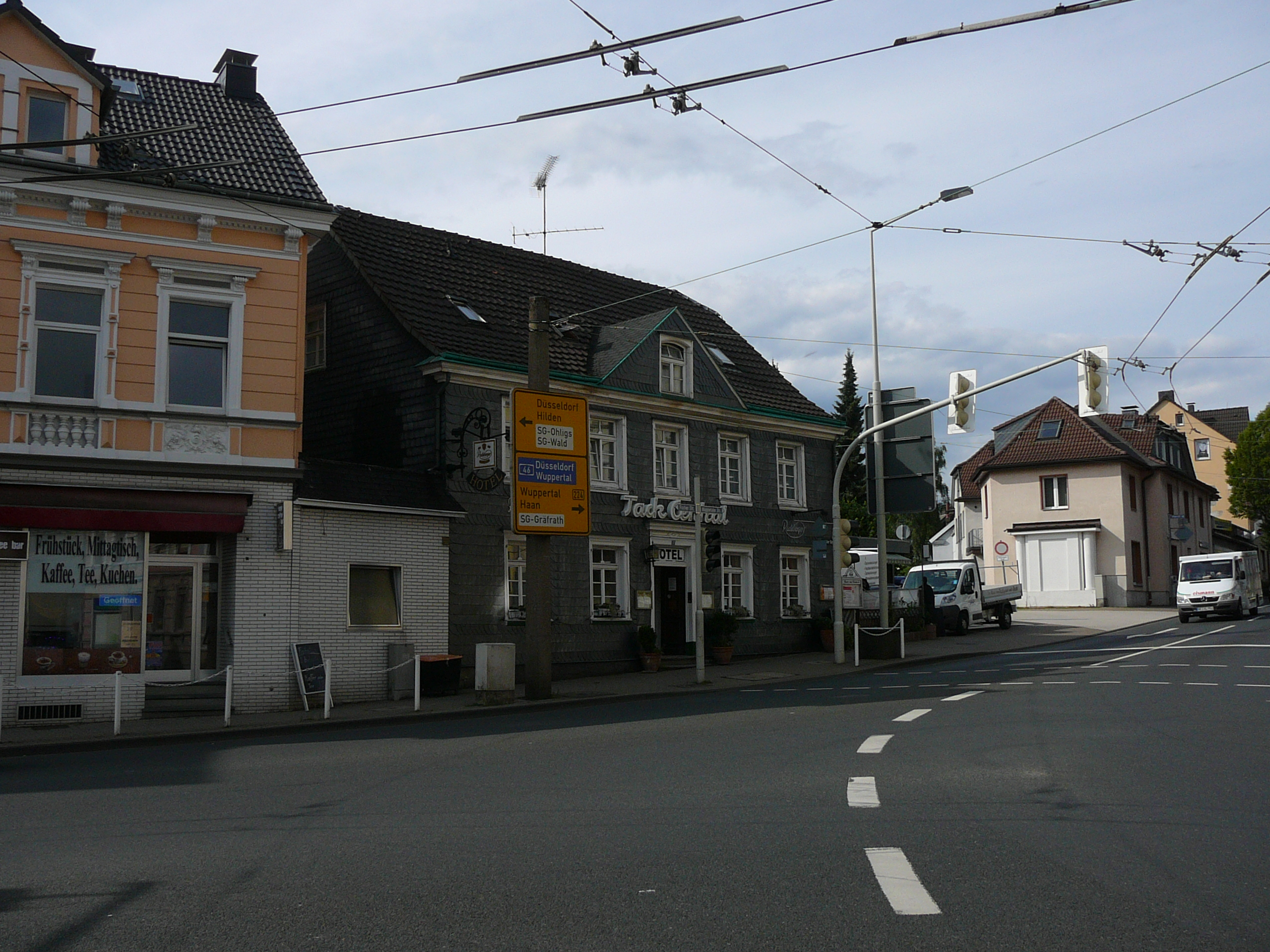 Wuppertaler Straße, Solingen